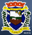 Brasão